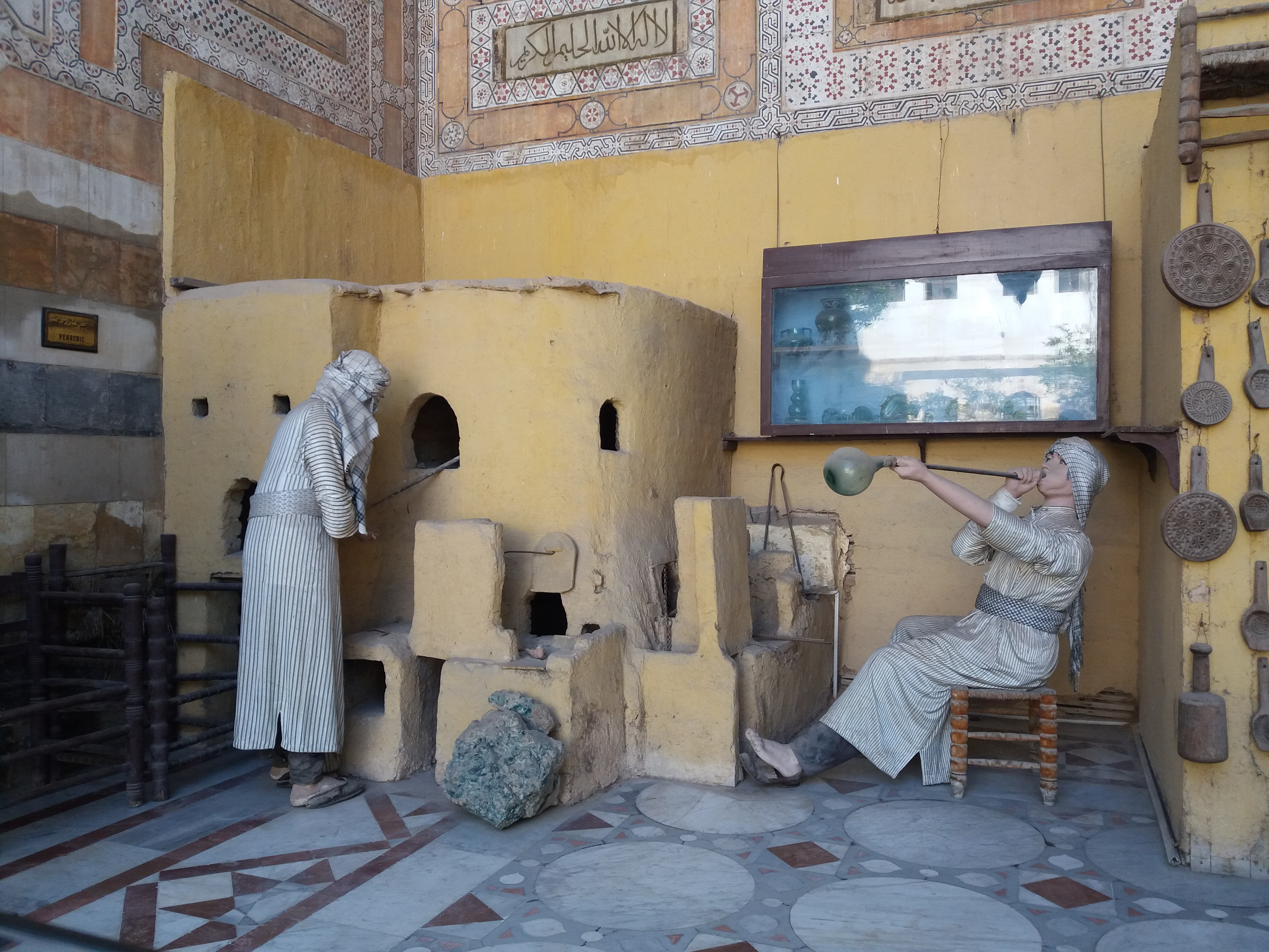 قاعة الحرف اليديوية في السلملك